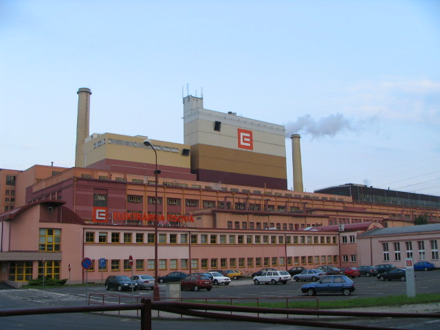 Elektrárna Tisová